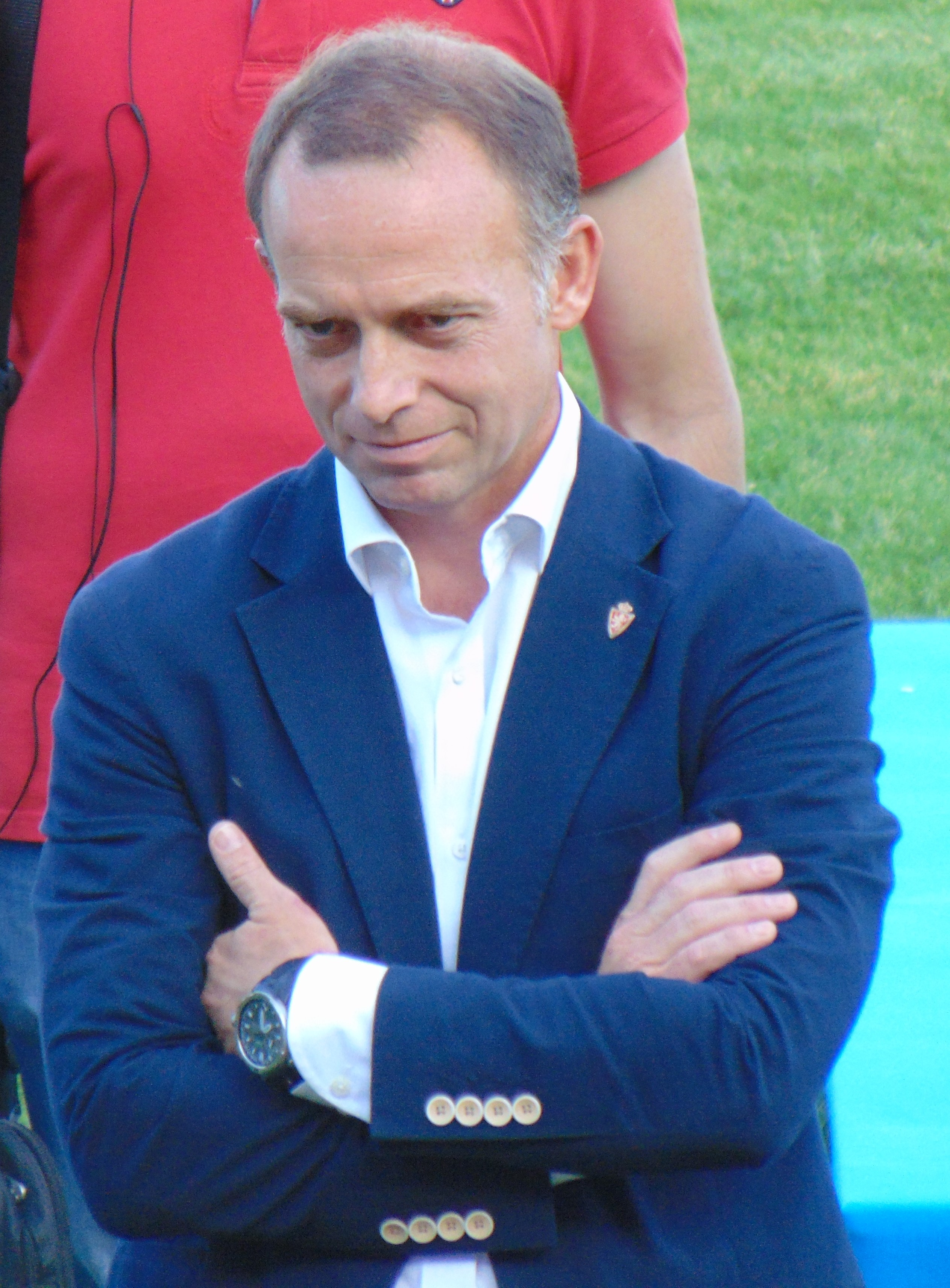 El presidente del Real Zaragoza, Cristhian Lapetra en julio de 2017.